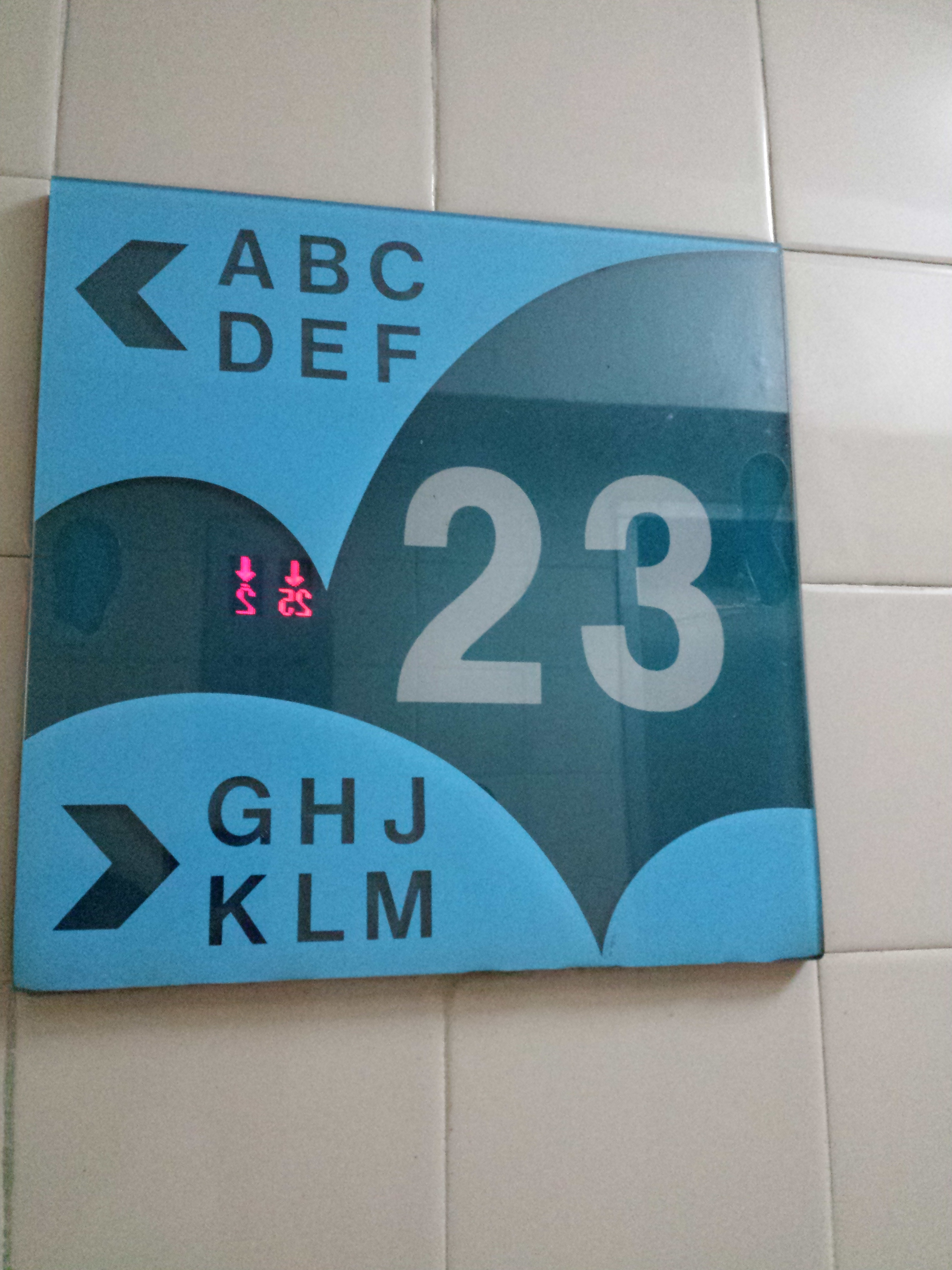 中文（香港）: 雲疊花園樓層指示牌